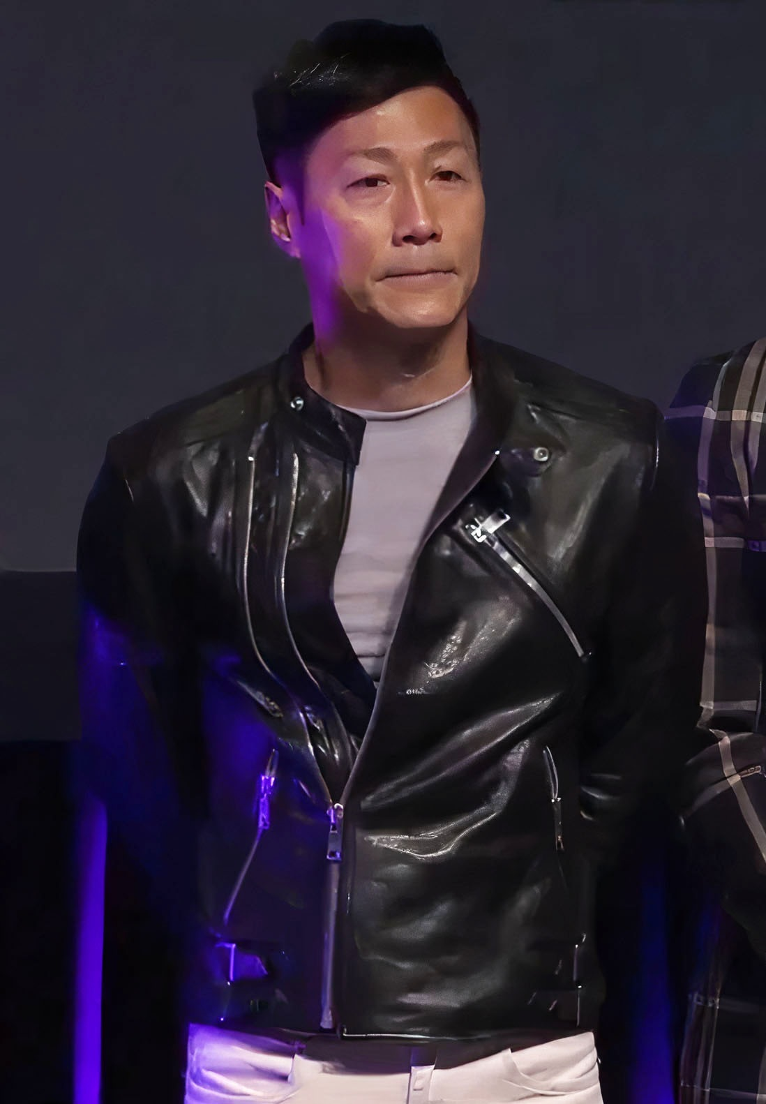 中文（香港）: 《2019英皇電影項目巡禮》